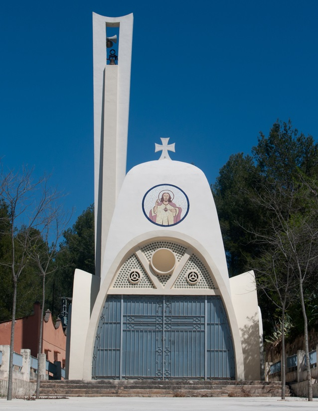 La chapelle du Doux-Nom-de-Marie de Bixquert.